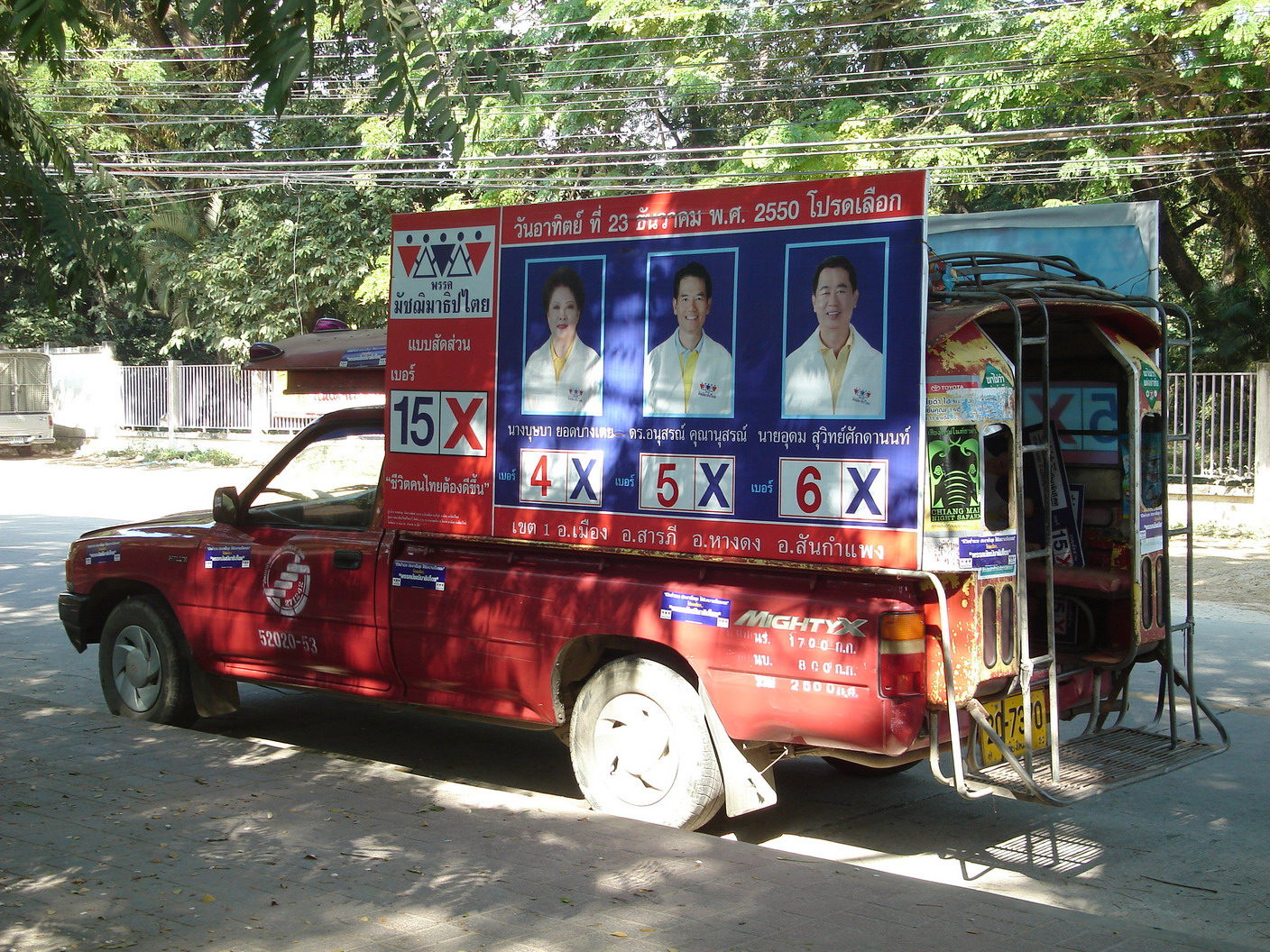 รถหาเสียง ผู้สมัครระบบแบ่งเขต พรรคมัชฌิมาธิปไตย -- Chiang Mai, Thailand